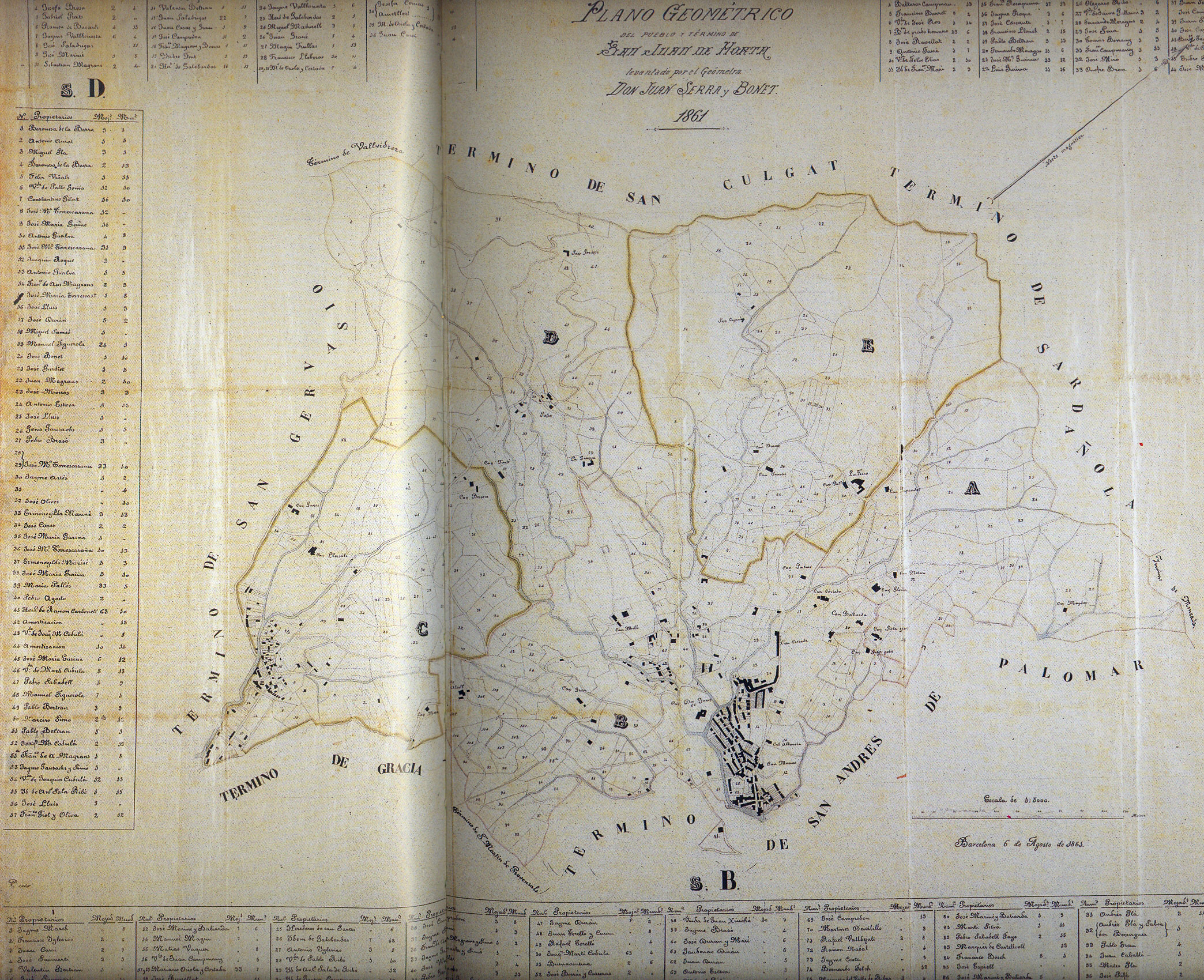 Plano geométrico del pueblo y término de San Juan de Horta, Joan Serra i Bonet, 1861